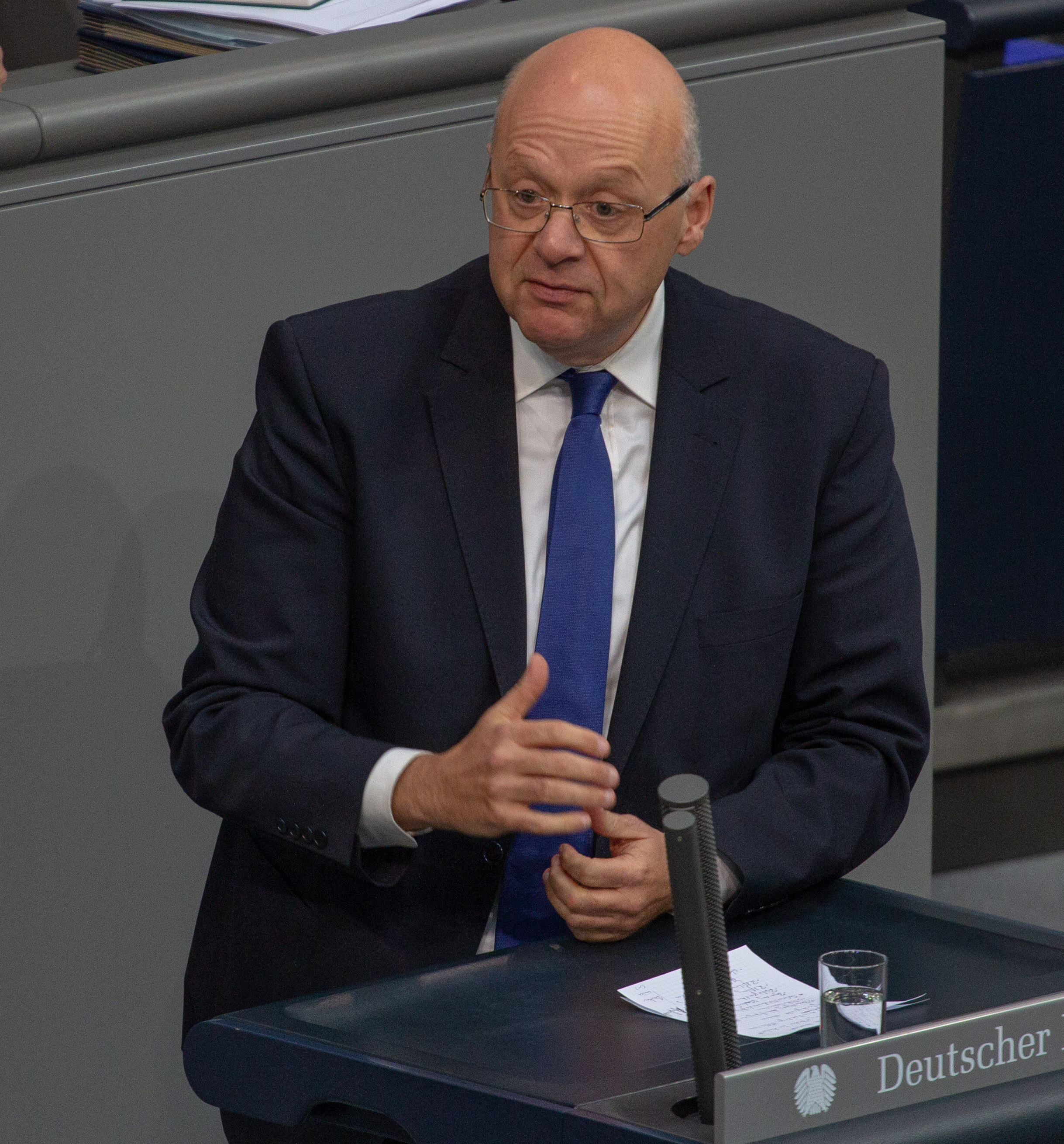 Alexander Radwan, Mitglied des Deutschen Bundestages, während einer Plenarsitzung am 11. April 2019 in Berlin.